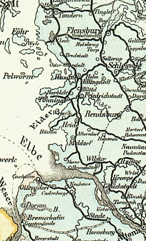 Ausschnitt Marschbahn aus der Bahnkarte_Deutschland_1899